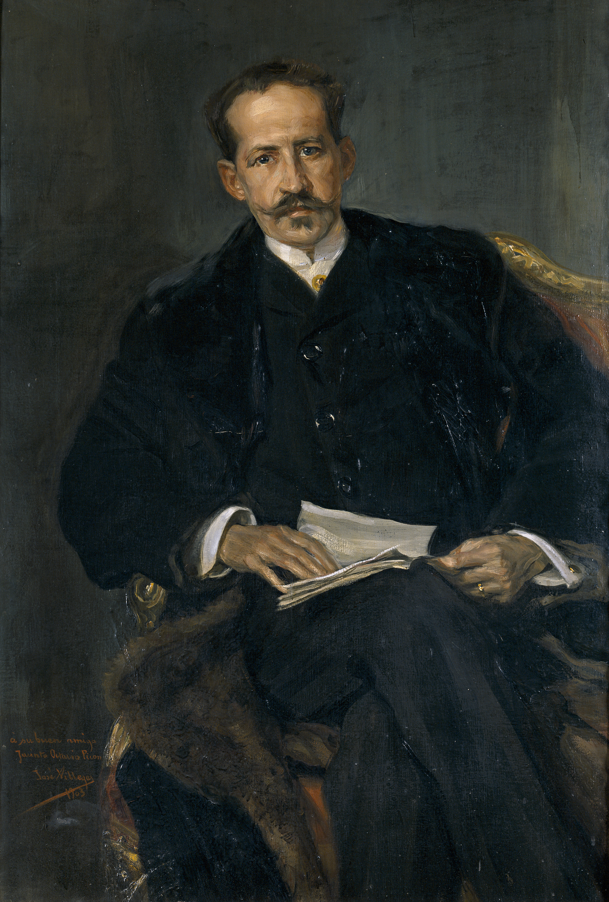 Retrato del escritor, pintor, crítico de arte y periodista español Jacinto Octavio Picón (1852-1923).